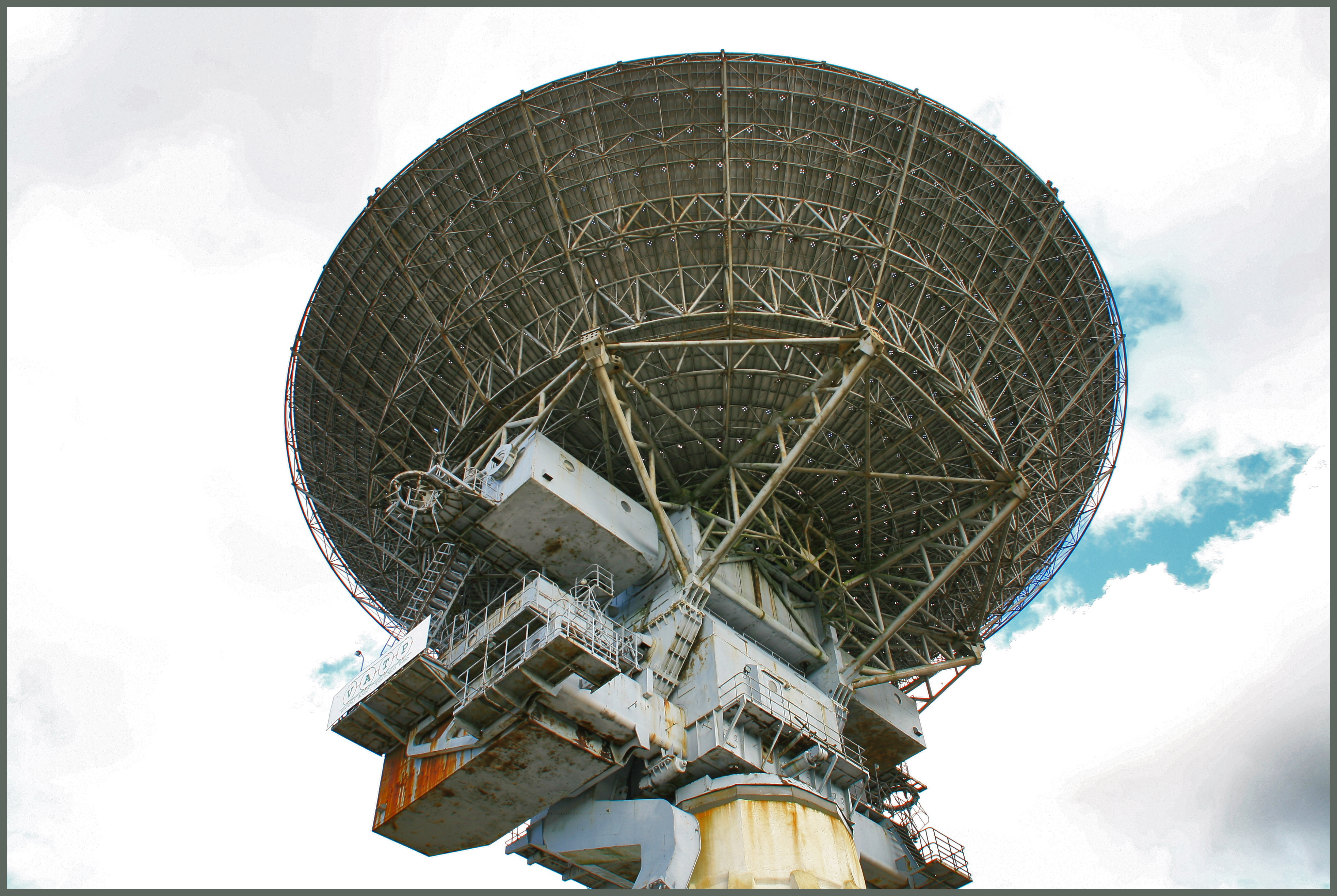 Ventspils International Radio Astronomy Center - radiotelescope ("Irbene Locator")